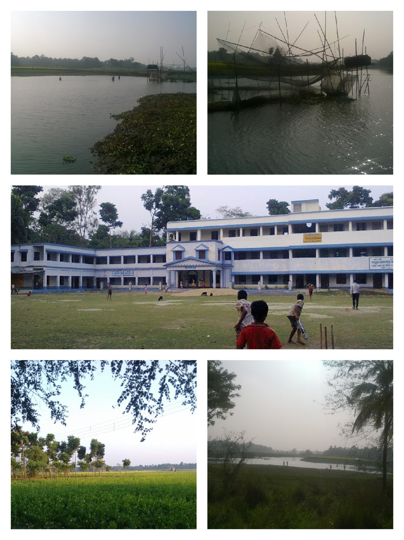 খড়ুয়া রাজাপুর